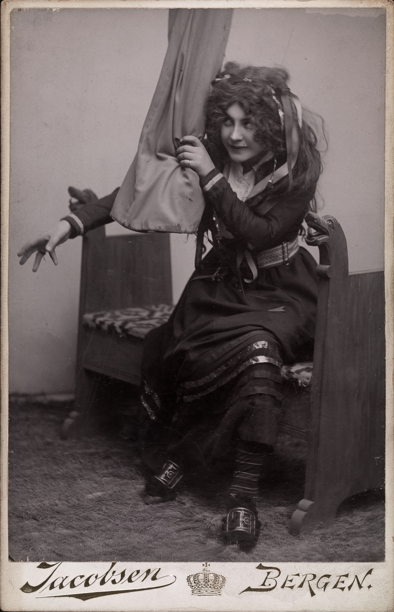 Signe Thora Aas Danning (1878-1980) var en norsk skuespiller som spilte i fire stumfilmer i Norge før hun og ektemannen, den danske komponisten Christian Danning, flyttet til Odense i Danmark. Dette er et rollebilde fra ca. år 1900.